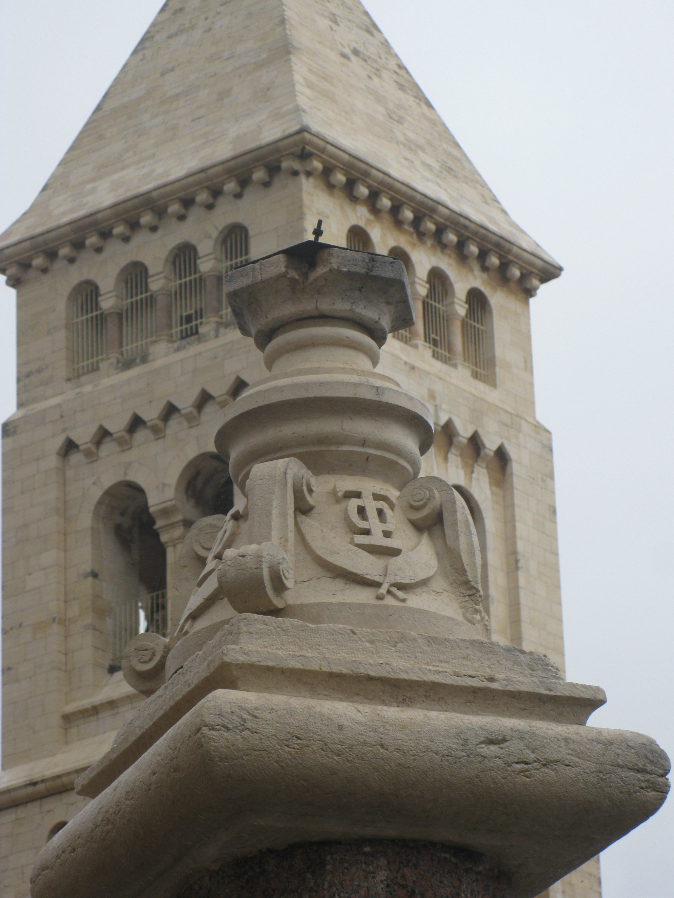 The Christian Quarter - the Muristan הרובע הנוצרי בעיר העתיקה של ירושלים שוק המוריסטאן